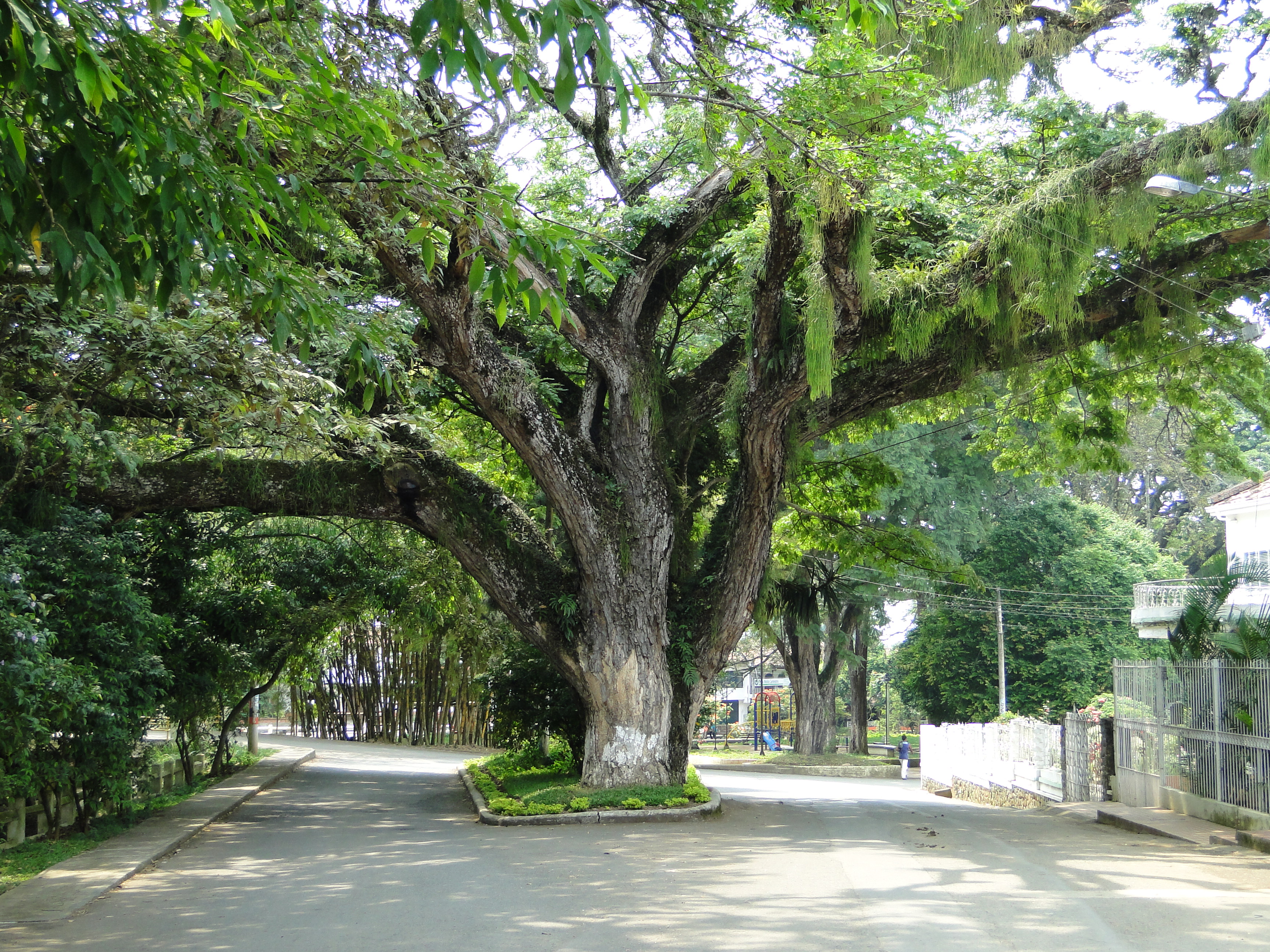 Icono representante de la tierra de oro